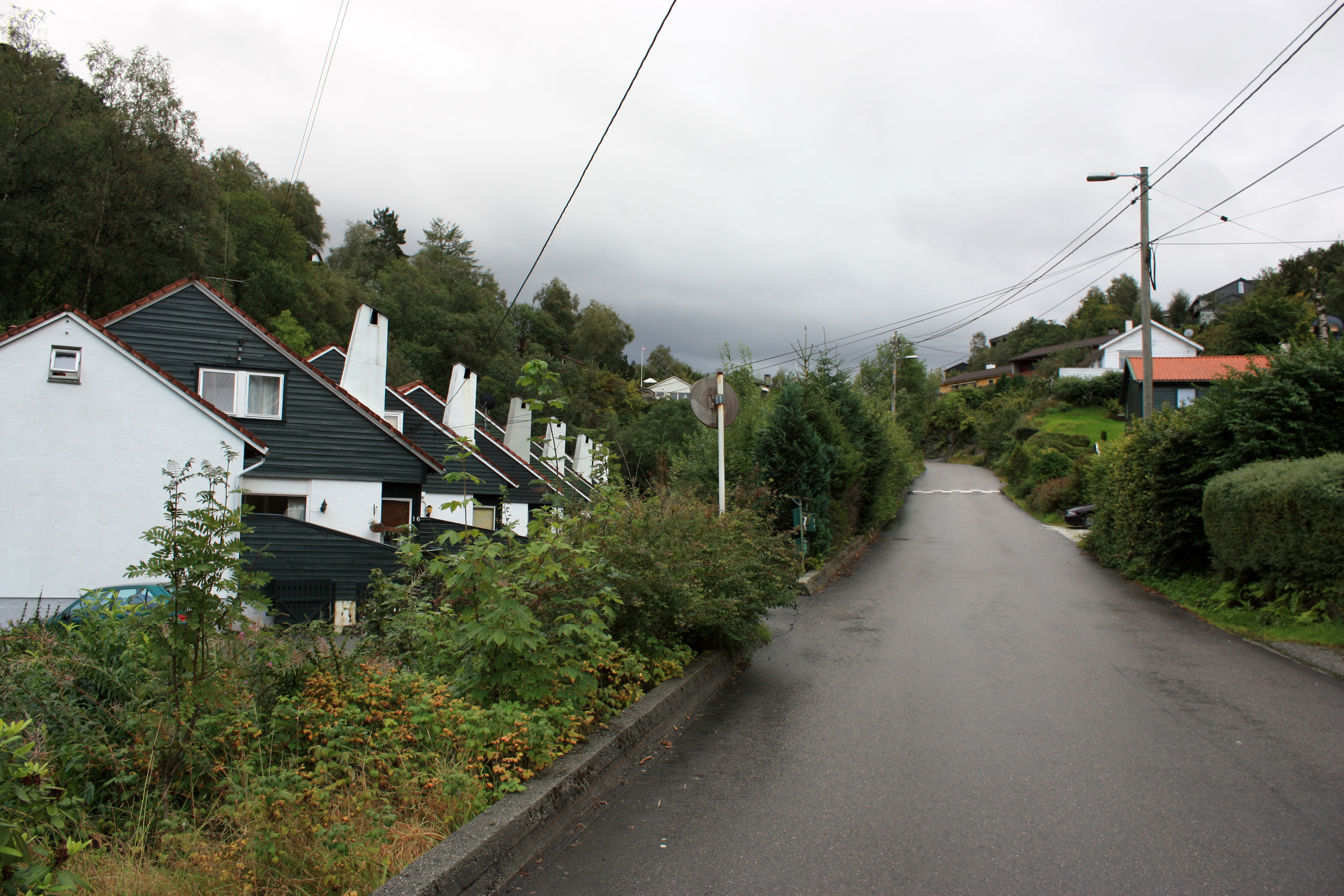 Lille Skjolddalen, Fana, Bergen.